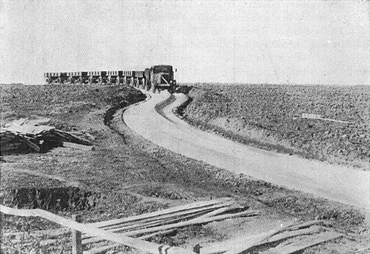 La Guidovia sperimentale alla Borgata Fogaccia